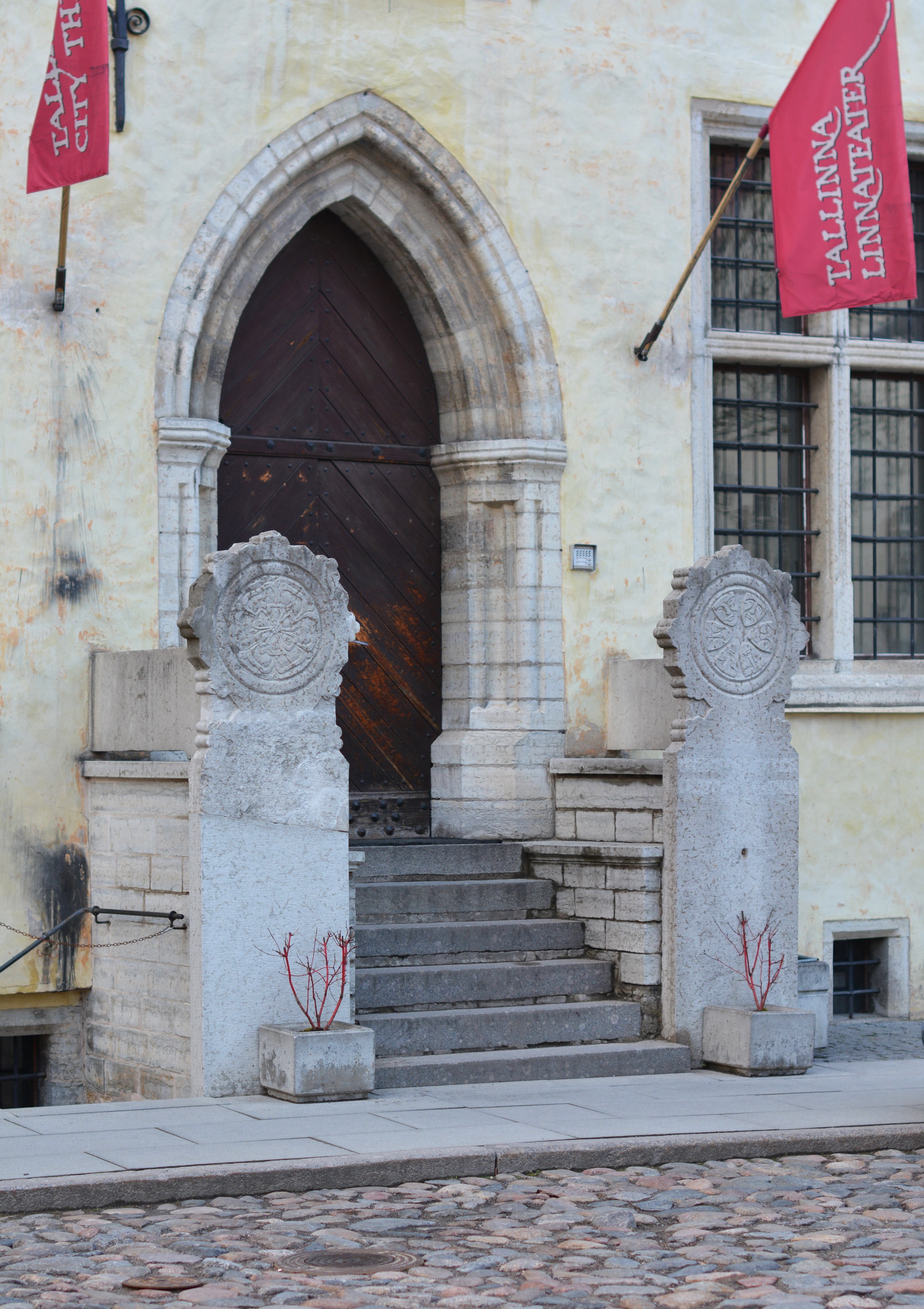 Esimesena rekonstrueeriti etik 1972. aastal Linnateatri ees. Etiku külge paigaldati Niguliste kiriku lõunaküljelt leitud roosimotiiviga kivi, mis pärineb 15. või 16. sajandist.